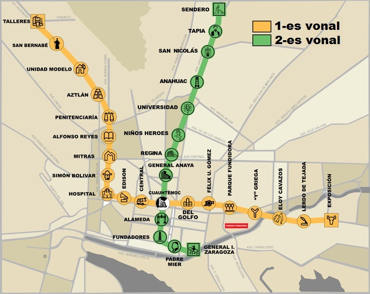 Monterrey metróhálózatának térképe